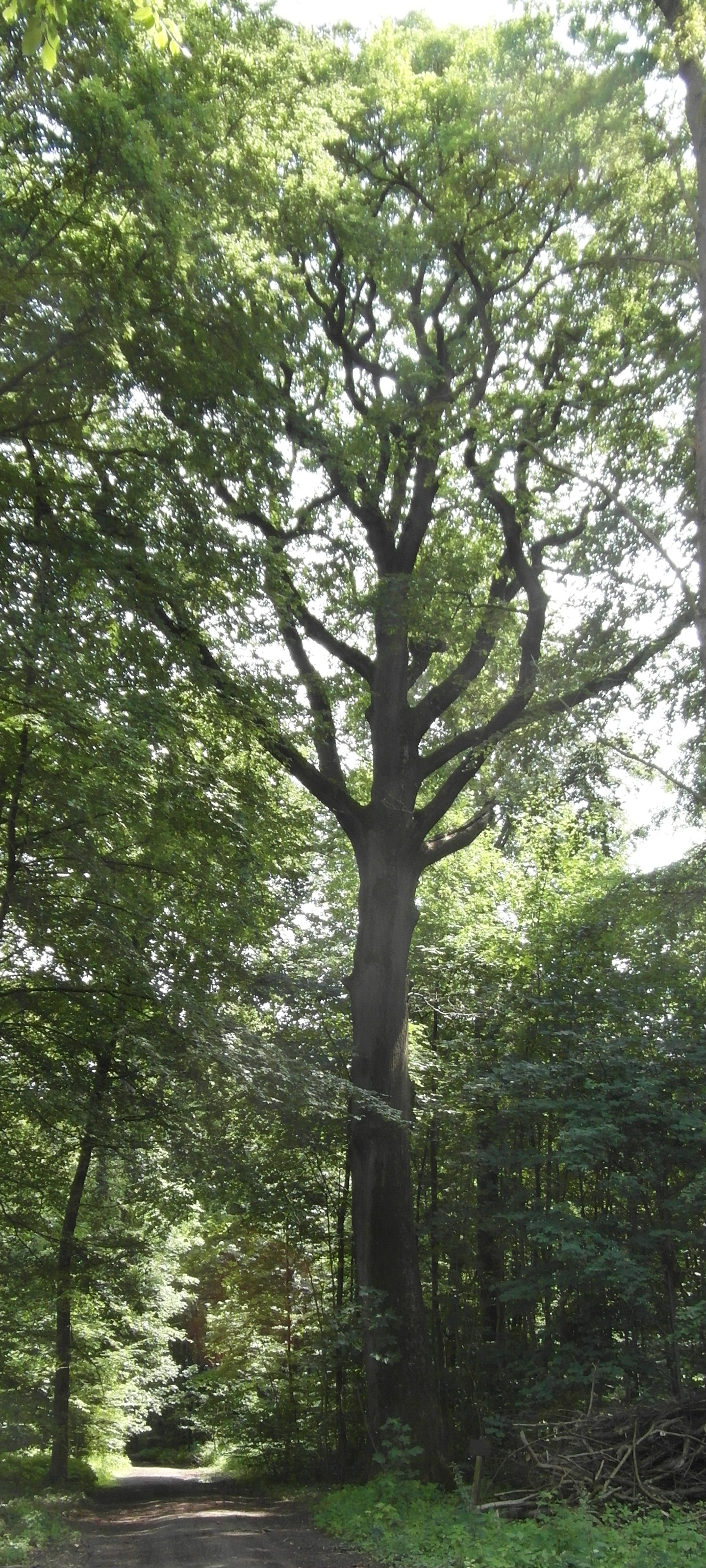 Reichseiche, eine als Naturdenkmal (ND-H 153) geschützte Stieleiche (Quercus robur) in Wennigsen (Deister), Region Hannover, Niedersachsen